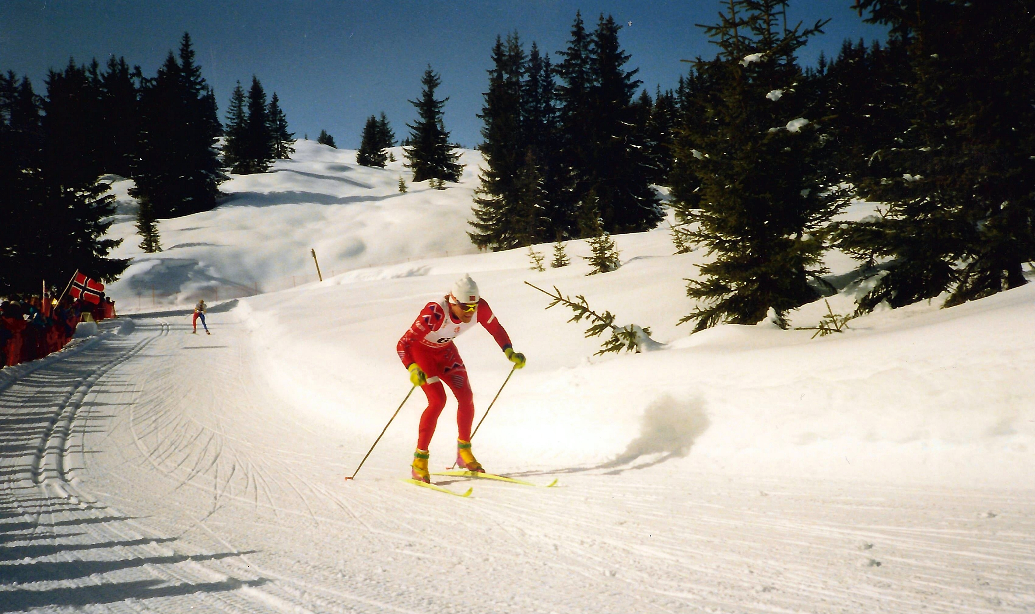 Vegard Ulvang lors du 50 km hommes des J.O. d'Alberville, le 22 février 1992.